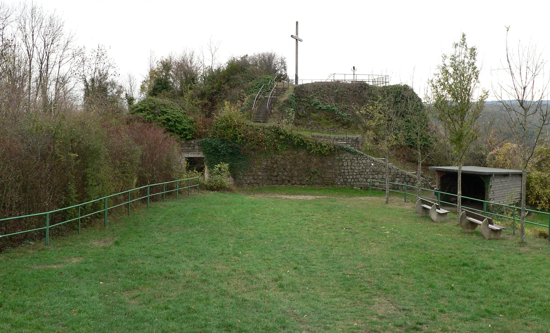 Ruine der Reichsburg Landskron, Blick von der Niederburg auf die Oberburg, heute Aussichtsplattform